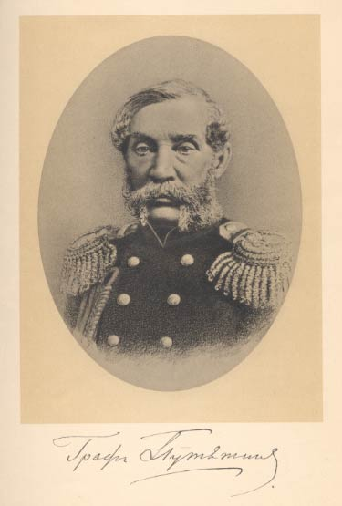 Портрет Е. В. Путятина Старый фотографический портрет Е. В. Путятина.